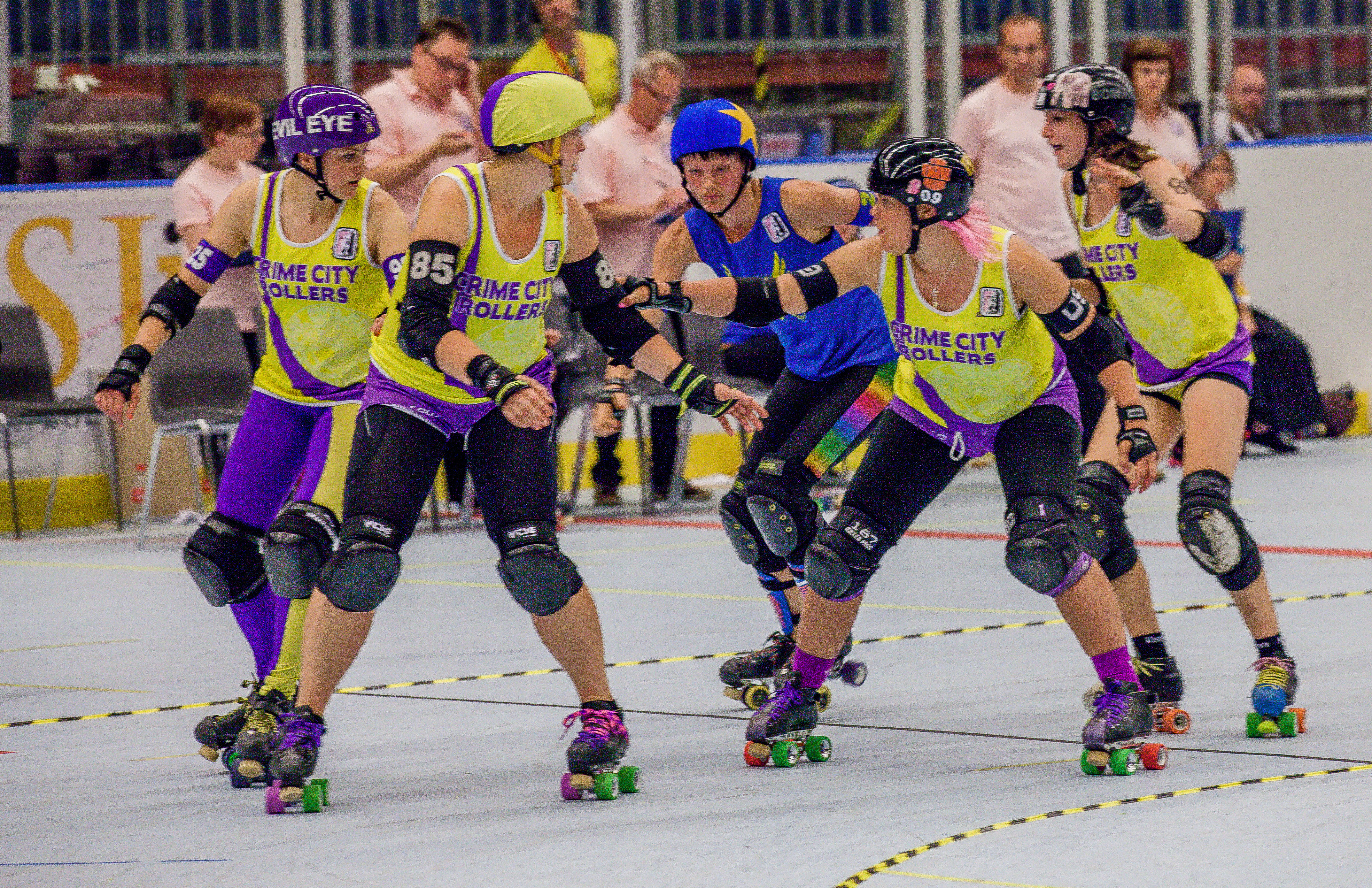 Final Stockholm Roller derby möter Crime City Rollers (Malmö). SM i Roller Derby 2013 i Halmstad Arena